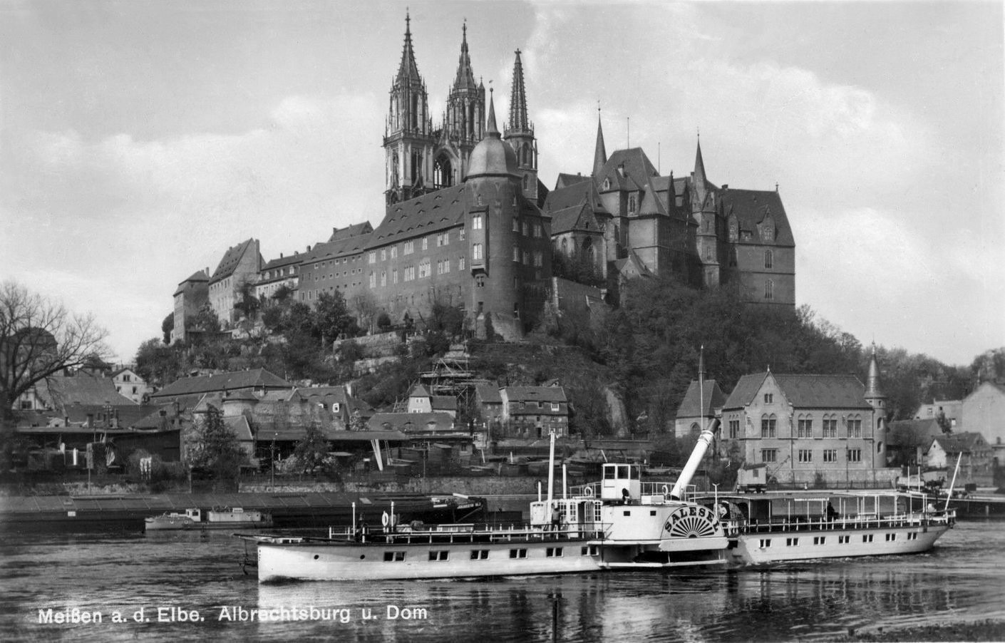 Meißen; Albrechtsburg und Dom - Elbe mit Dampfer Salesel This postcard is from publisher Brück & Sohn in Meißen ( postcard has a unique number 25979 and is available in a higher resolution at the publisher. This images was uploaded in a cooperation project between Wikipedians and the publisher.